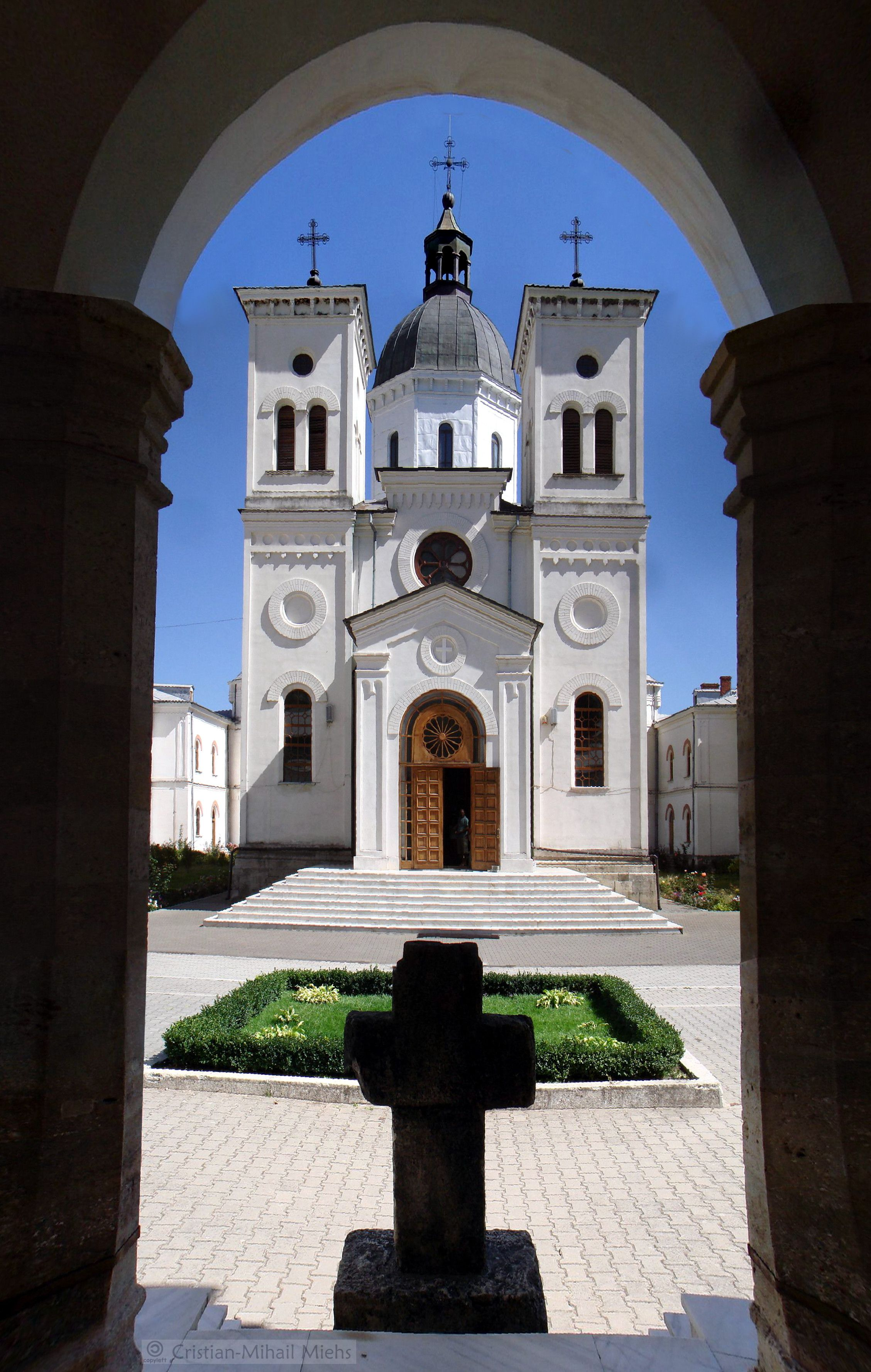 Biserica "Adormirea Maicii Domnului", Mănăstirea Bistrița (1847-1856), judeţul Vâlcea, văzută din spatele crucii de piatră din incintă